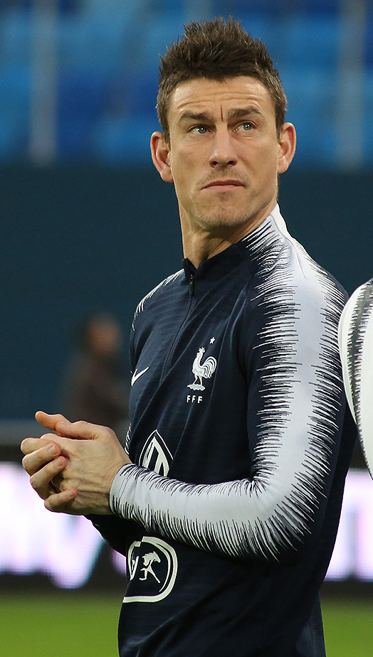 Звёзды сборной Франции готовятся к матчу с Россией